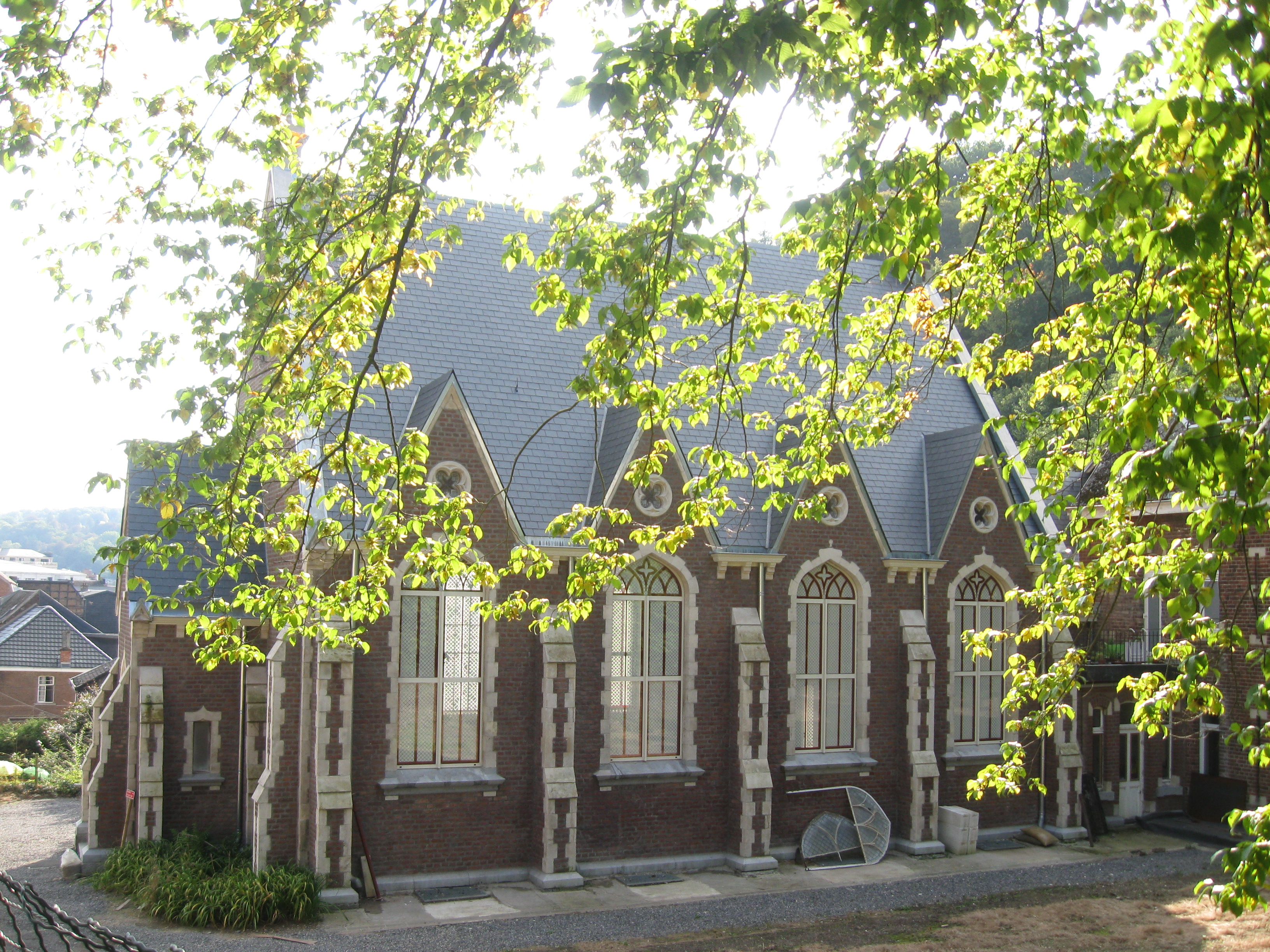 Nouveaux vitraux, surmontés des anciens médaillons, sur la façade Nord de l'église protestante de Spa